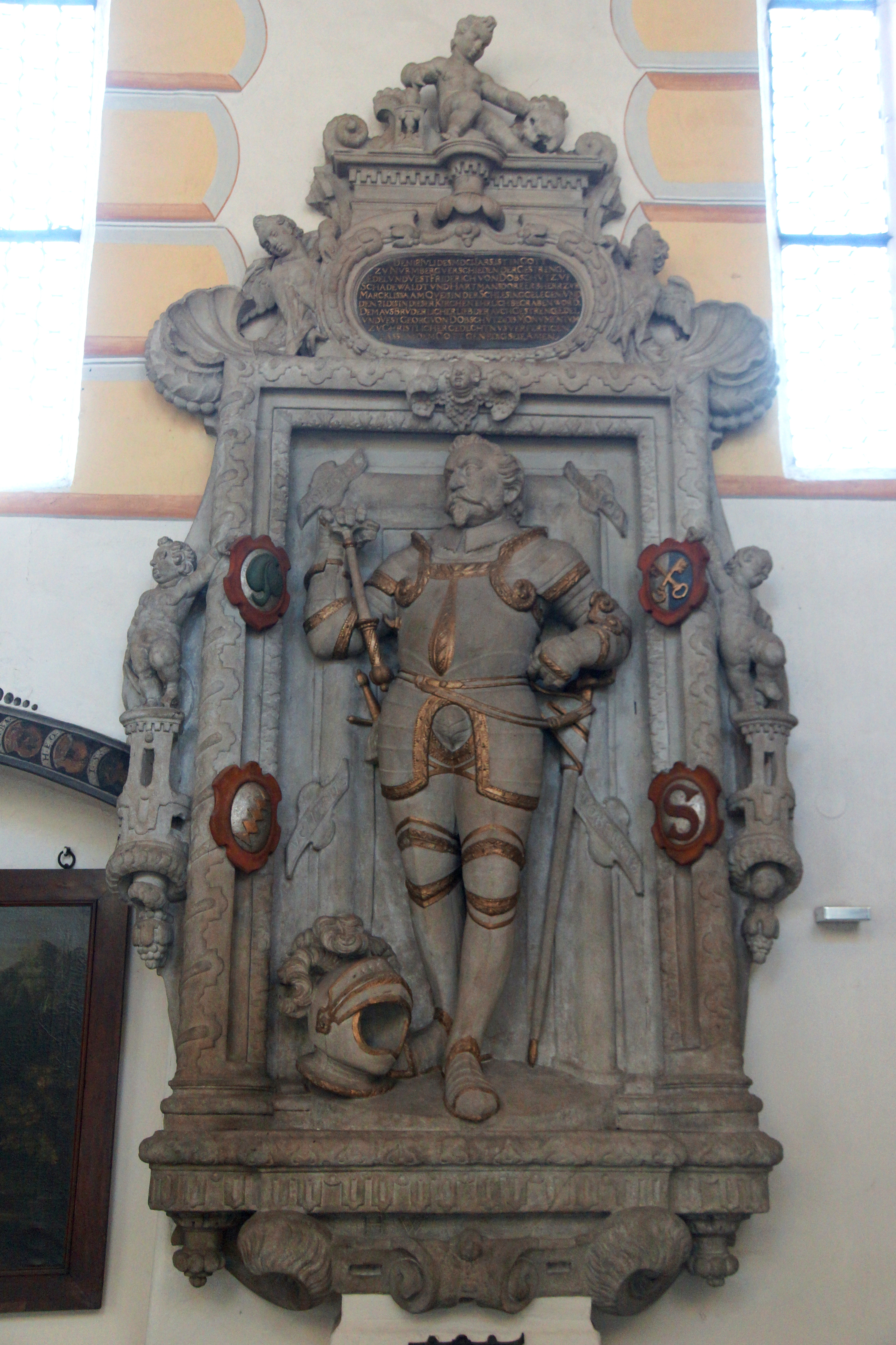 Die Friedhofskirche St. Johannis in Nürnberg